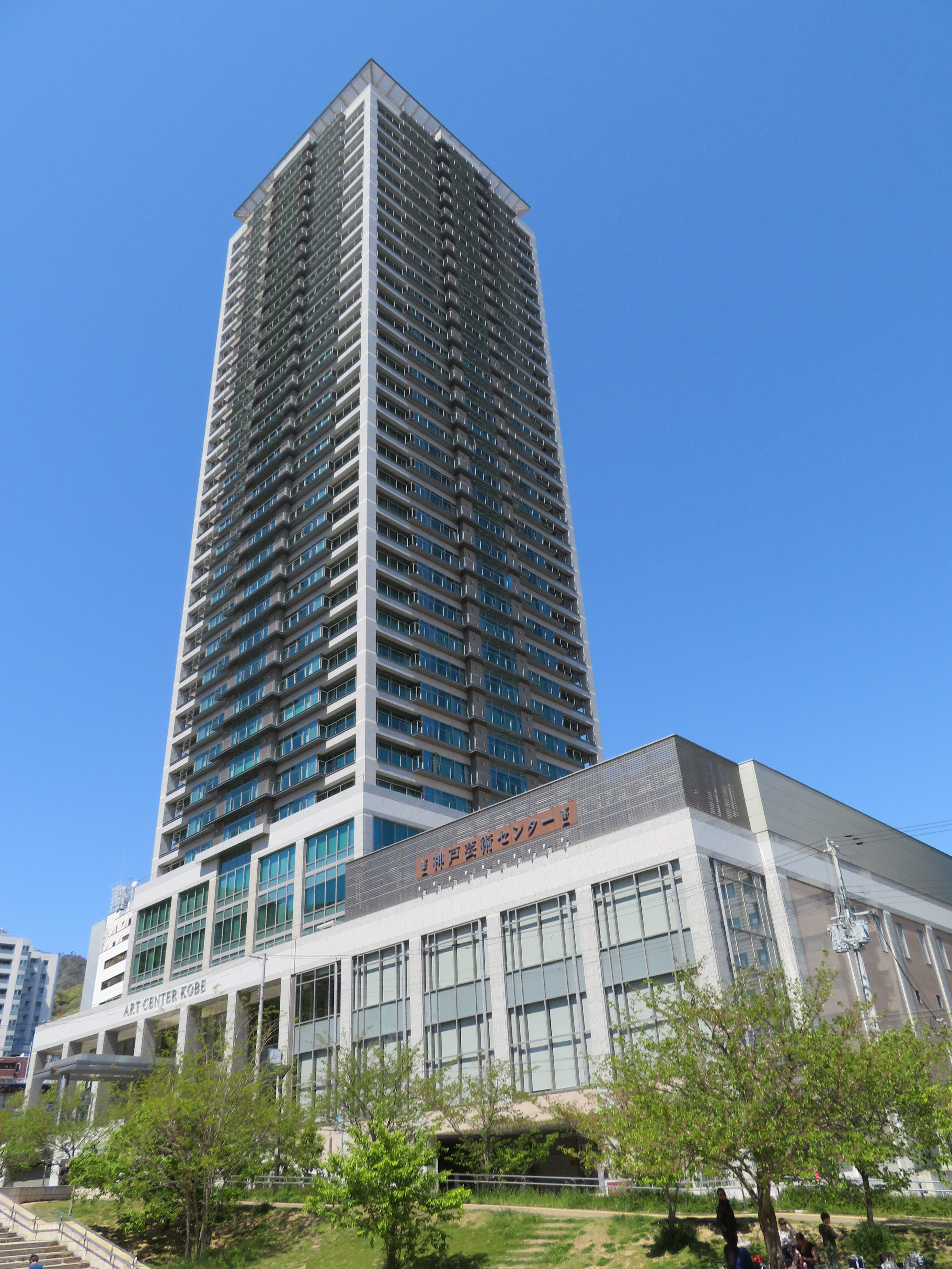 神戸芸術センター